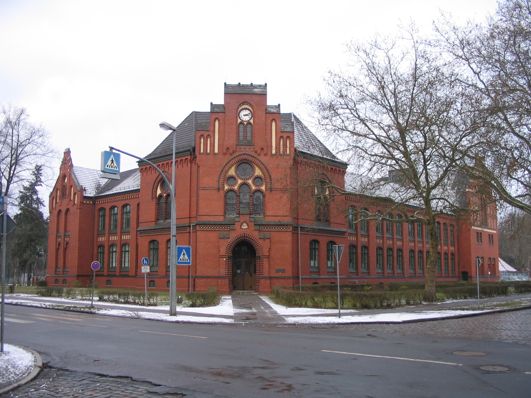 Haupthaus des Gymnasiums von Wittenberge